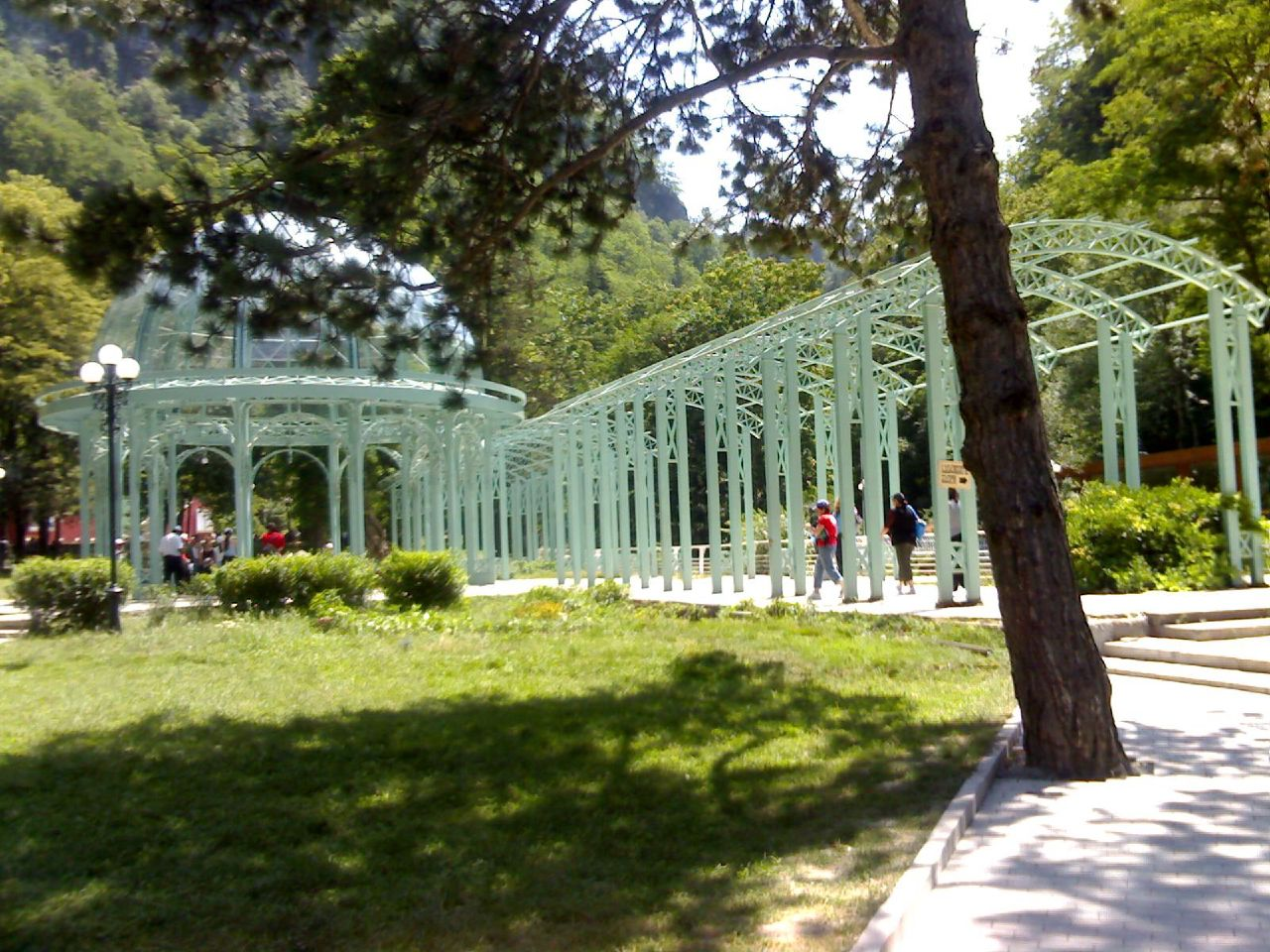 Borjomi